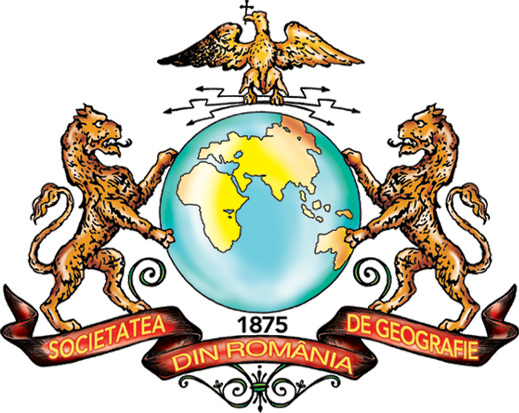 Sigla Societatii de Geografie din Romania